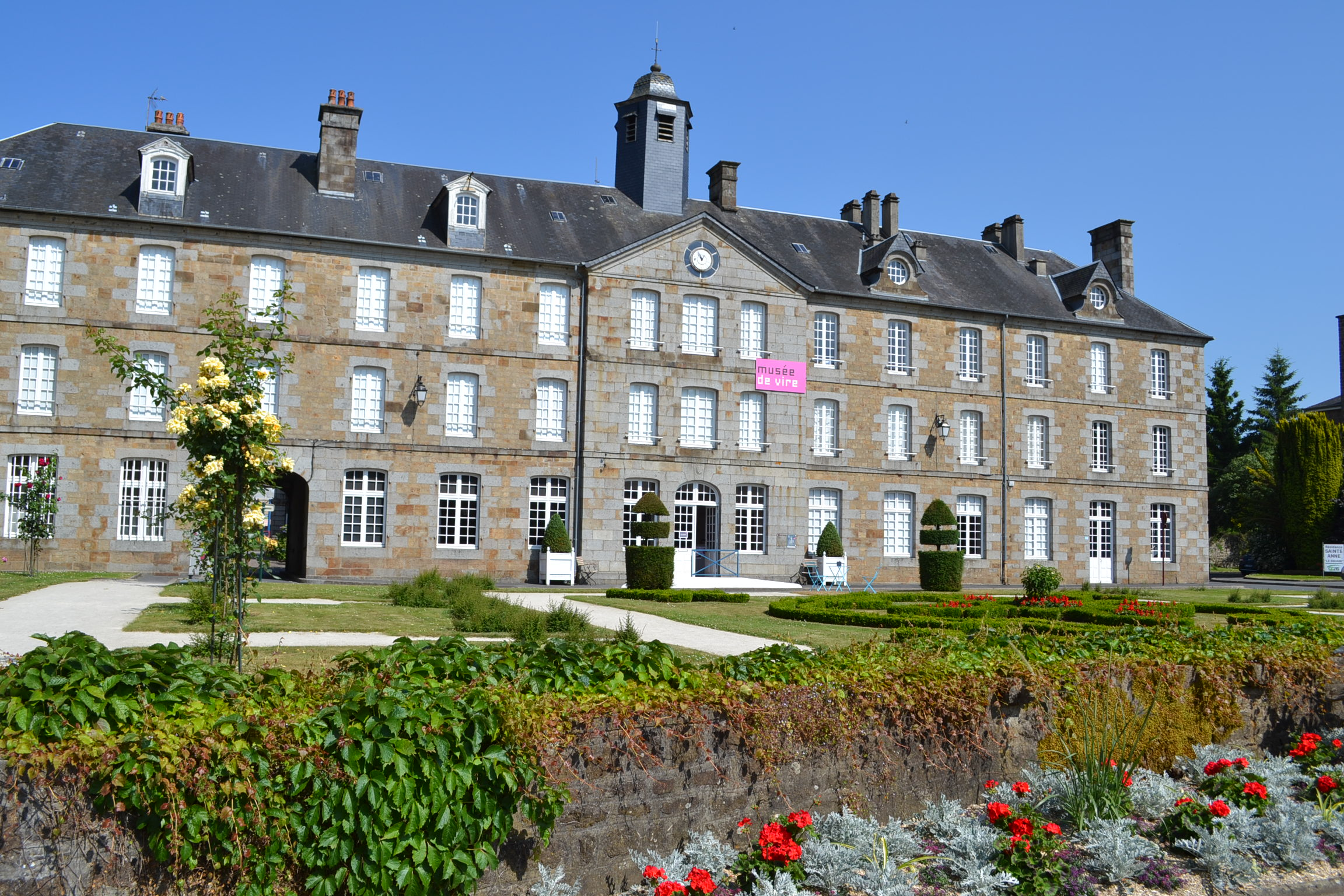 Façade du Musée municipal de Vire